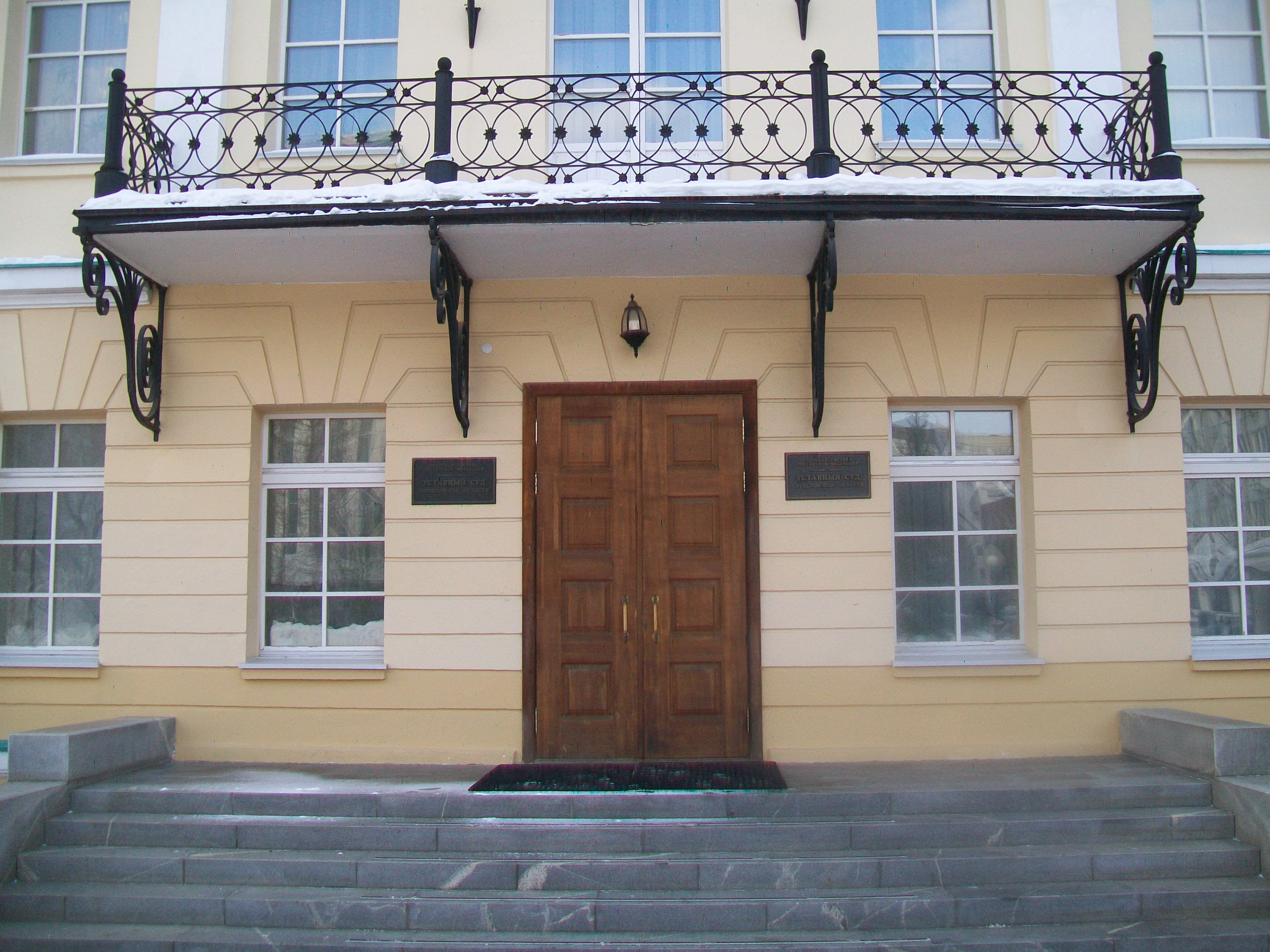 Вход в здание Уставного суда Свердловской области. Екатеринбург, февраль 2017 года